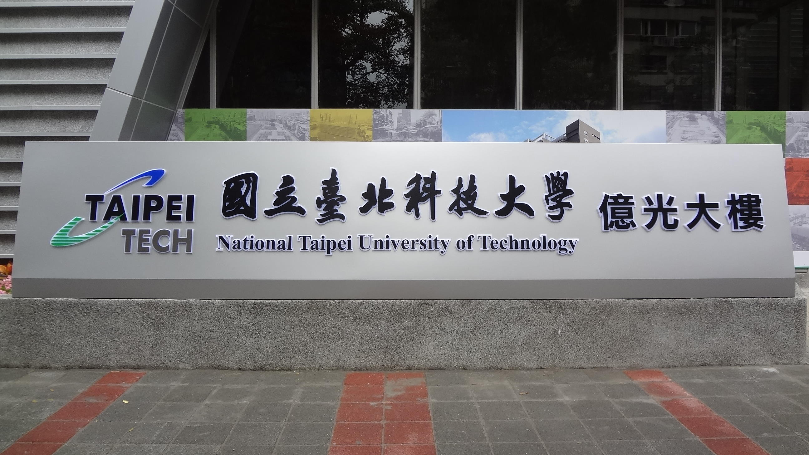 中文（台灣）: 國立臺北科技大學億光大樓銘牌。